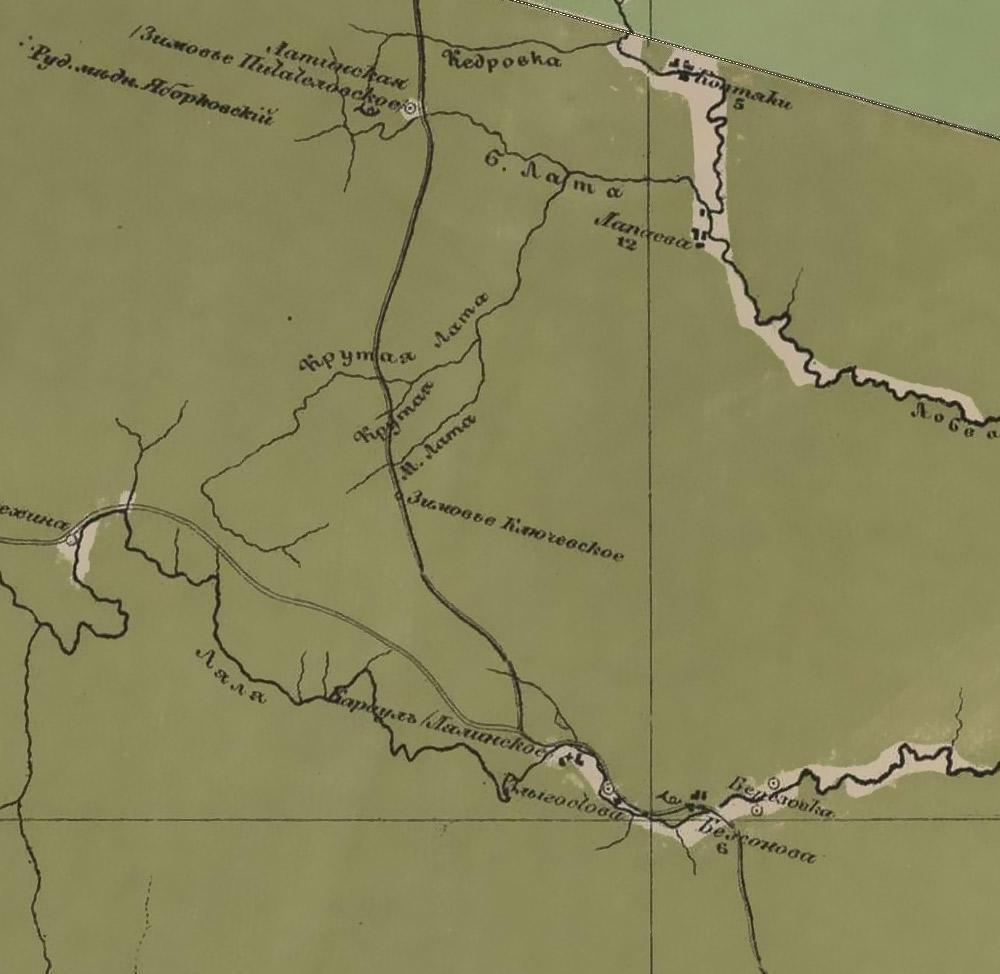 Карта И. А. Стрельбицкого. Восток Европейской части России, 1871. год, фрагмент: Большая Лата - Ляля